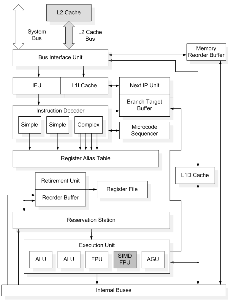 Функциональная схема процессоров семейства P6 (P-Pro, PII, P-III, Celeron)